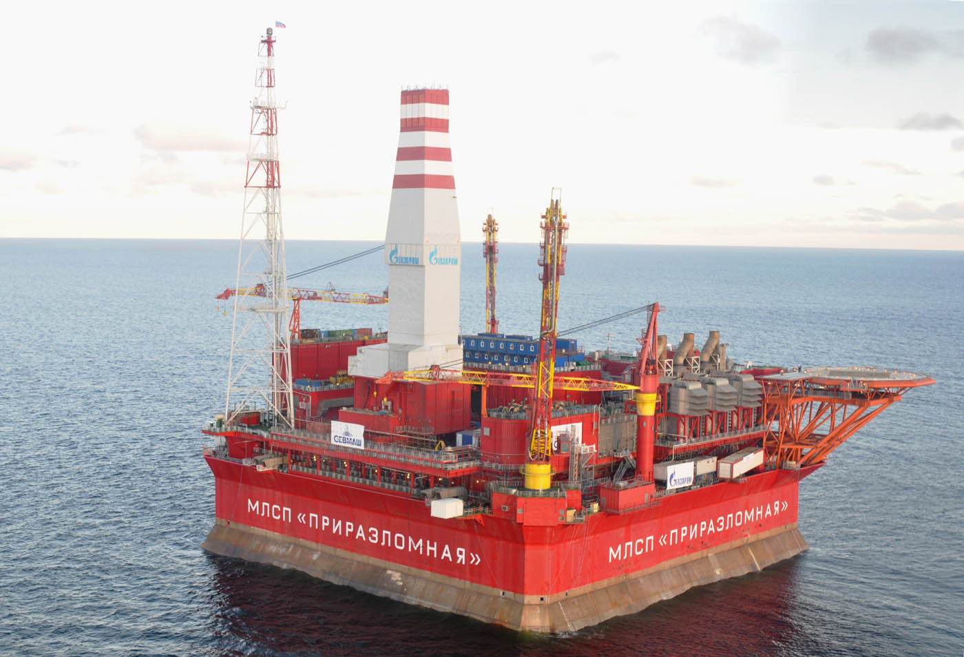 gfas